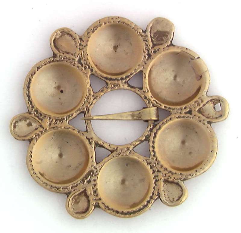 Skålsølje i messing fra Ål i Hallingdal. Foto Anne-Lise Reinsfelt / Norsk Folkemuseum, NF.1915-1470.